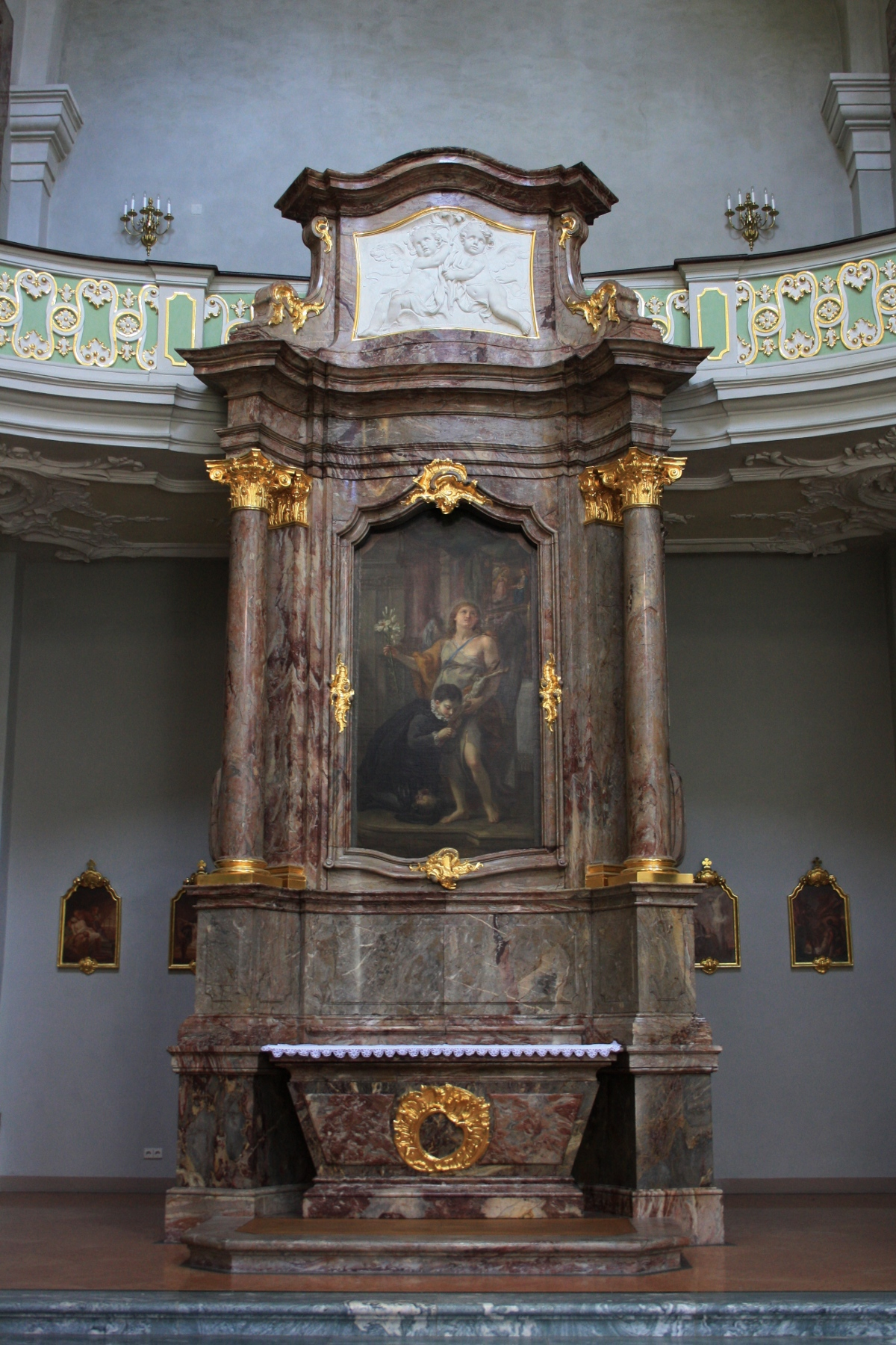 Seitenaltar